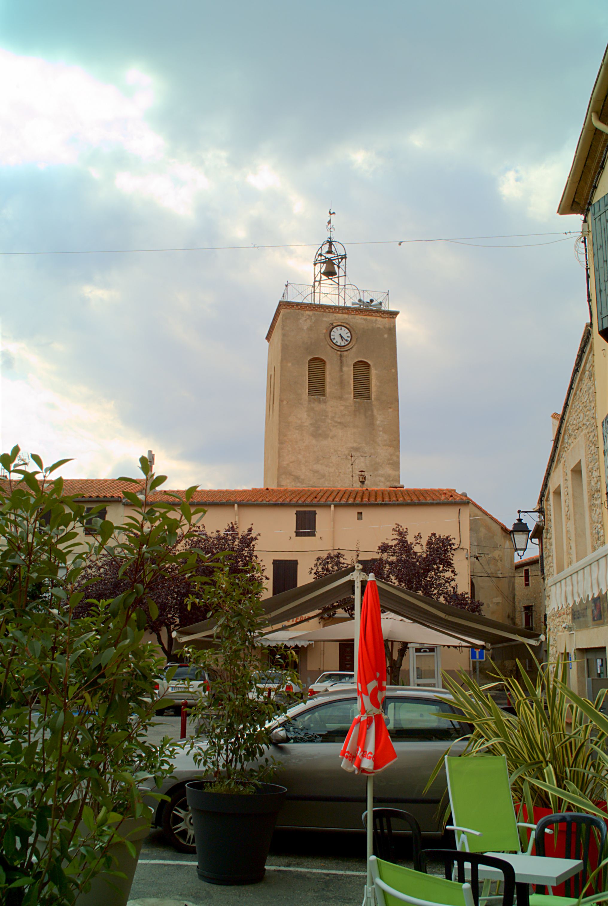 Clocher de l'église paroissiale Saint-Étienne, Maureillas-las-Illas (Pyrénées-Orientales, Languedoc-Roussillon, France), La Jonquera (Haut-Ampurdan, Catalogne, Espagne)